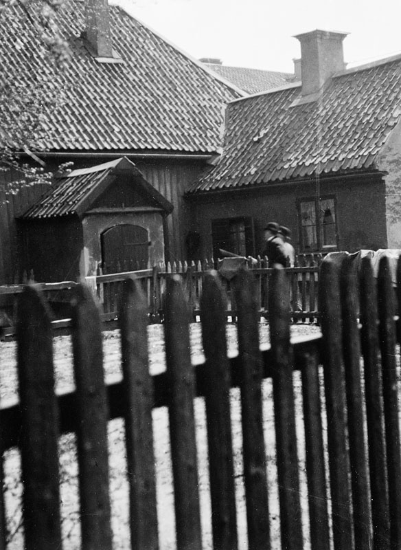 Södermannagatan 10-12, Södermalm, Stockholm, 1885-1919, SSM